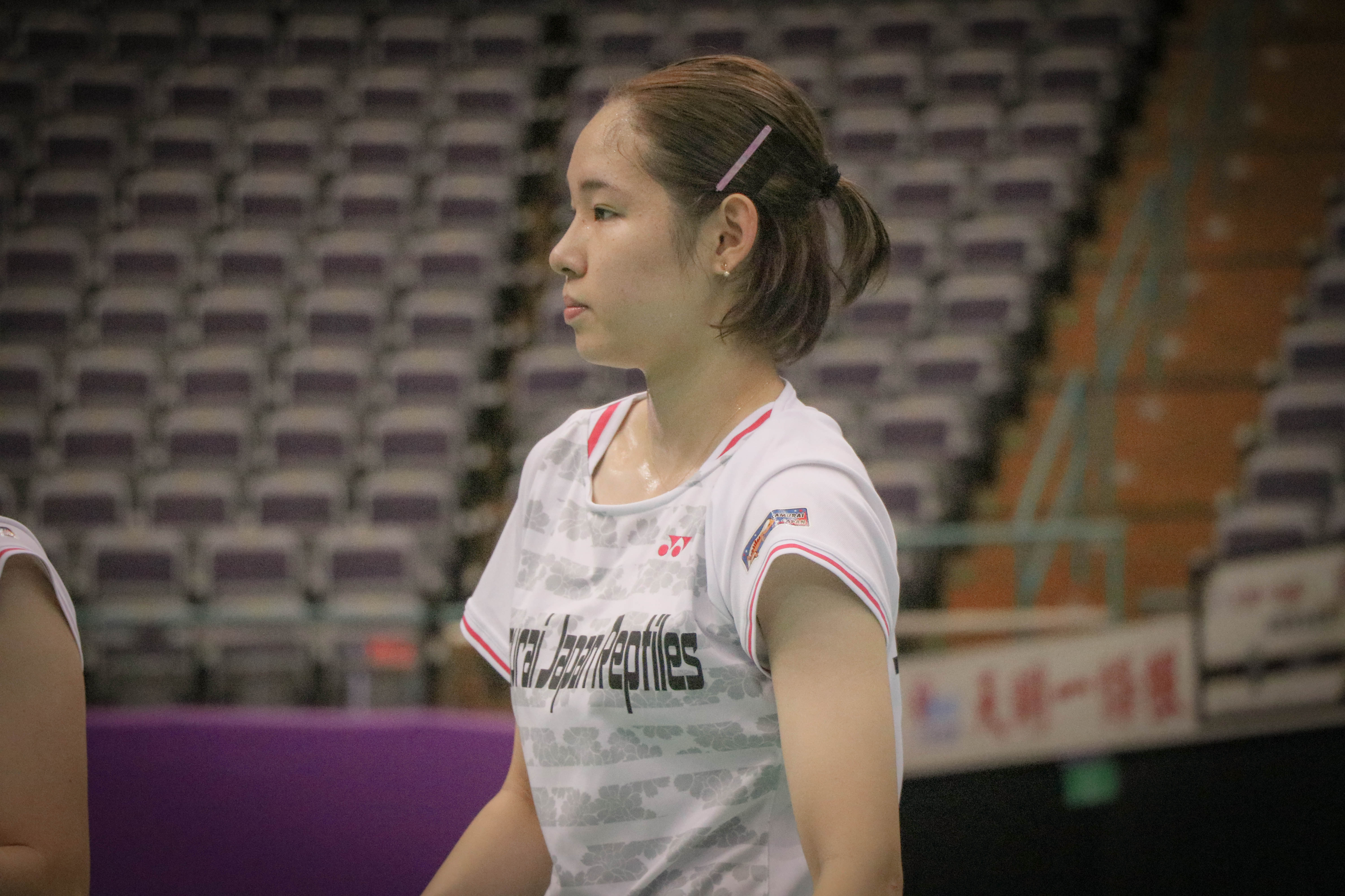 2018 台北OPEN 10/03